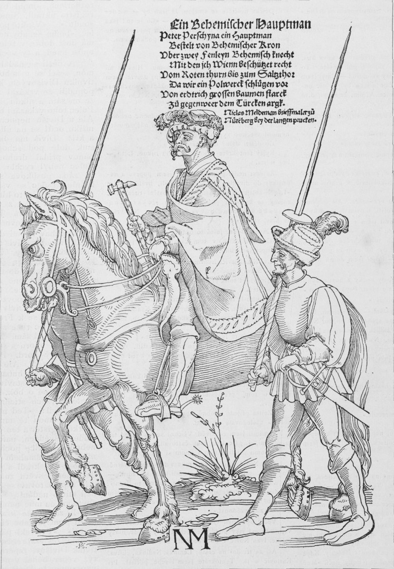 Капитан с двумя телохранителями, гравюра